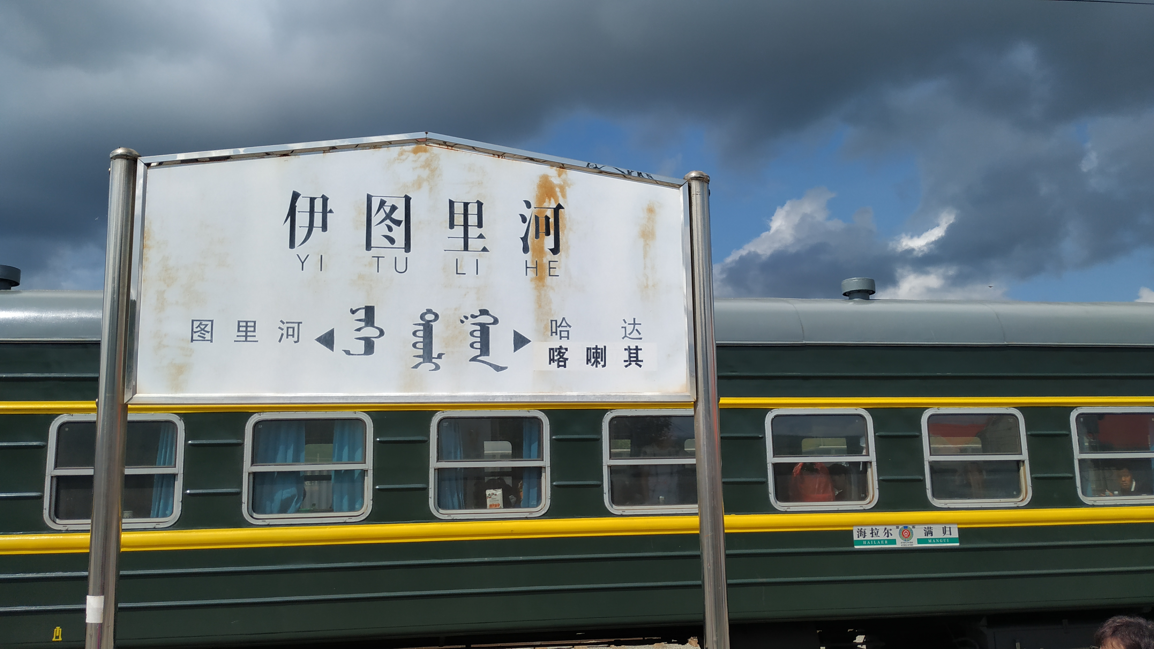 中文（中国大陆）: 4182次列车停靠在伊图里河站